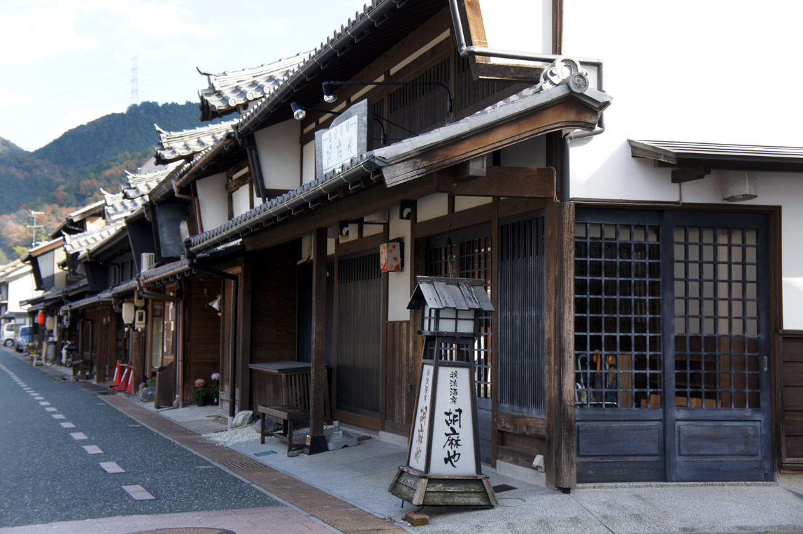 岐阜県美濃市美濃町 『うだつのあがる町並み』（重要伝統的建造物群保存地区）